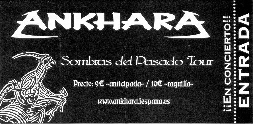 Ankhara Sombras Del Pasado Tour